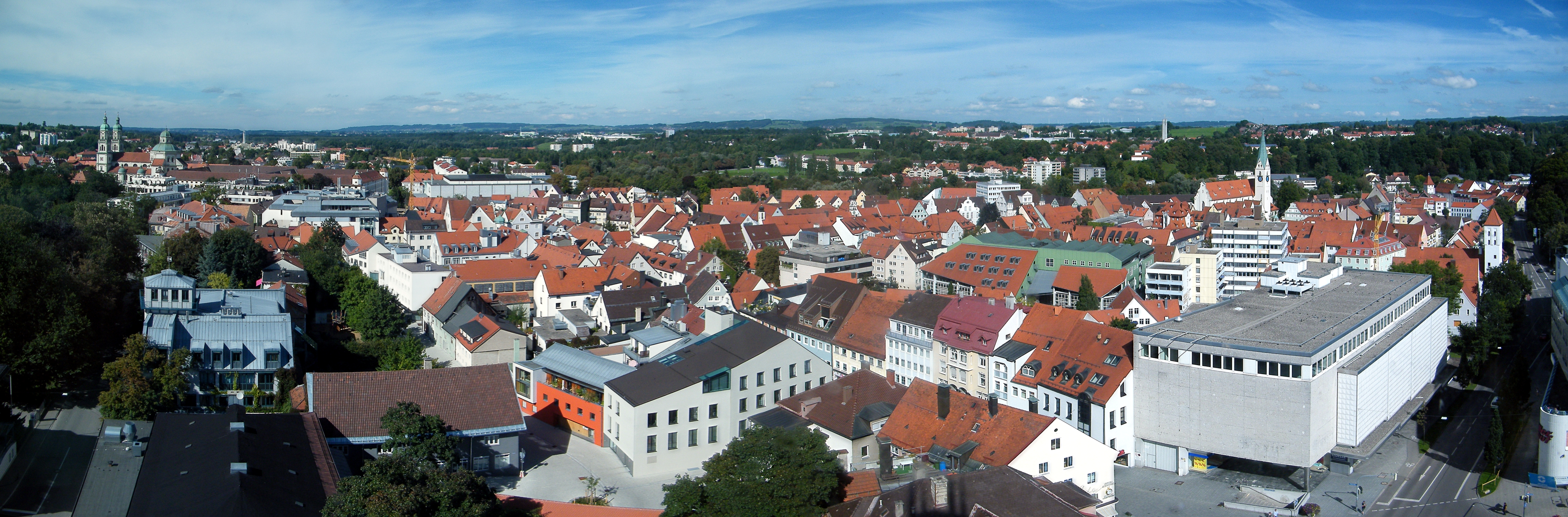 Panorama von Kempten, zusammengestellt aus 4 Einzelaufnahmen. Blick vom Skyline in den Norden. (aufgenommen mit Fujifilm Finepix S2000HD)